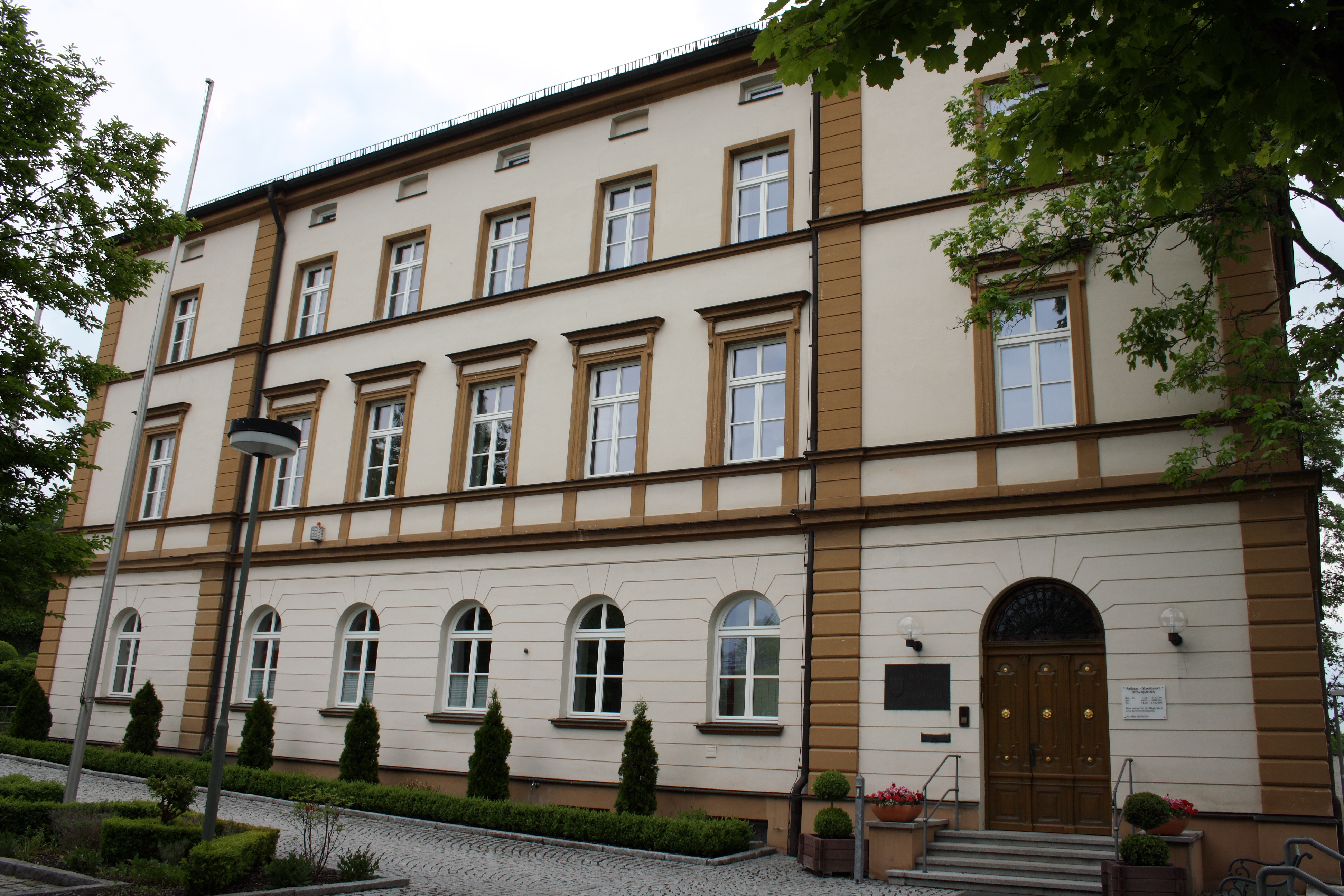 ehemaliges Amtsgericht, jetzt Rathaus in Burgau im Landkreis Günzburg (Bayern), Käppelestraß 11